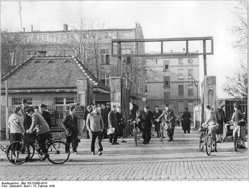 Teltow, VEB "Carl Ossietzky", Feierabend Zentralbild Zühlsdorf 14.2.1958 Das "Carl Ossietzky" Werk in Teltow im Zeichen der Vorbereitungen des V. Parteitages der SED Im VEB Werk für Bauelemente der Nachrichtentechnik "Carl Ossietzky", Teltow, diskutieren die Angehörigen des Werkes über die Beschlüsse der 35. Tagung des Zentralkomitees der SED und über das Gesetz zur Vervollkommnung der Arbeit des Staatsapparates unserer Republik. UBz: Es ist Arbeitsschluß. Blick auf das Eingangstor des Betriebes.